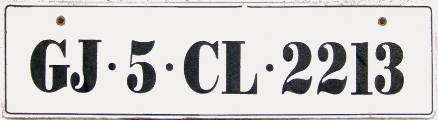 targa di auto dello stato indiano del Gujrat